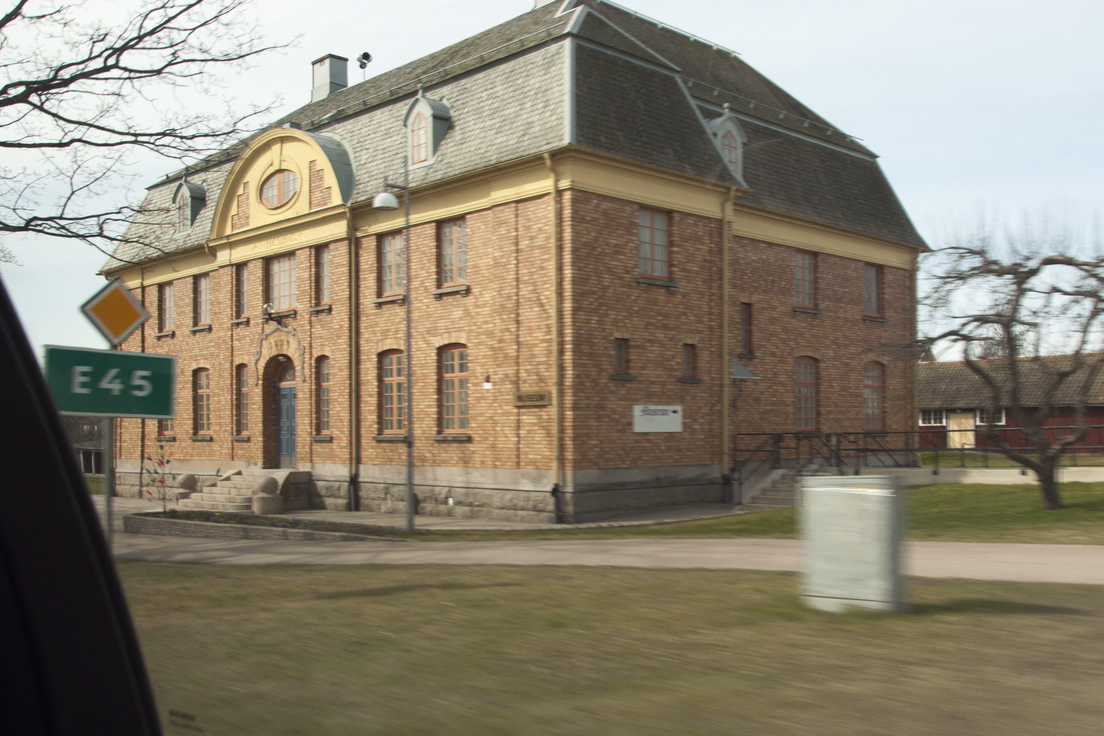 Tingshuset i Mellerud sett från bilfönster. Byggnadsår 1909 J H Larsson (Byggmästare) Lars Kellman (Arkitekt) Nordals och Sundals häraders tingshusbyggnadsskyldige (Byggherre)